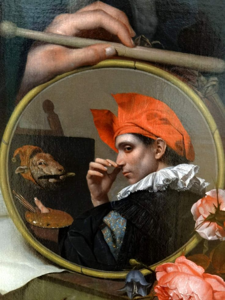 detail